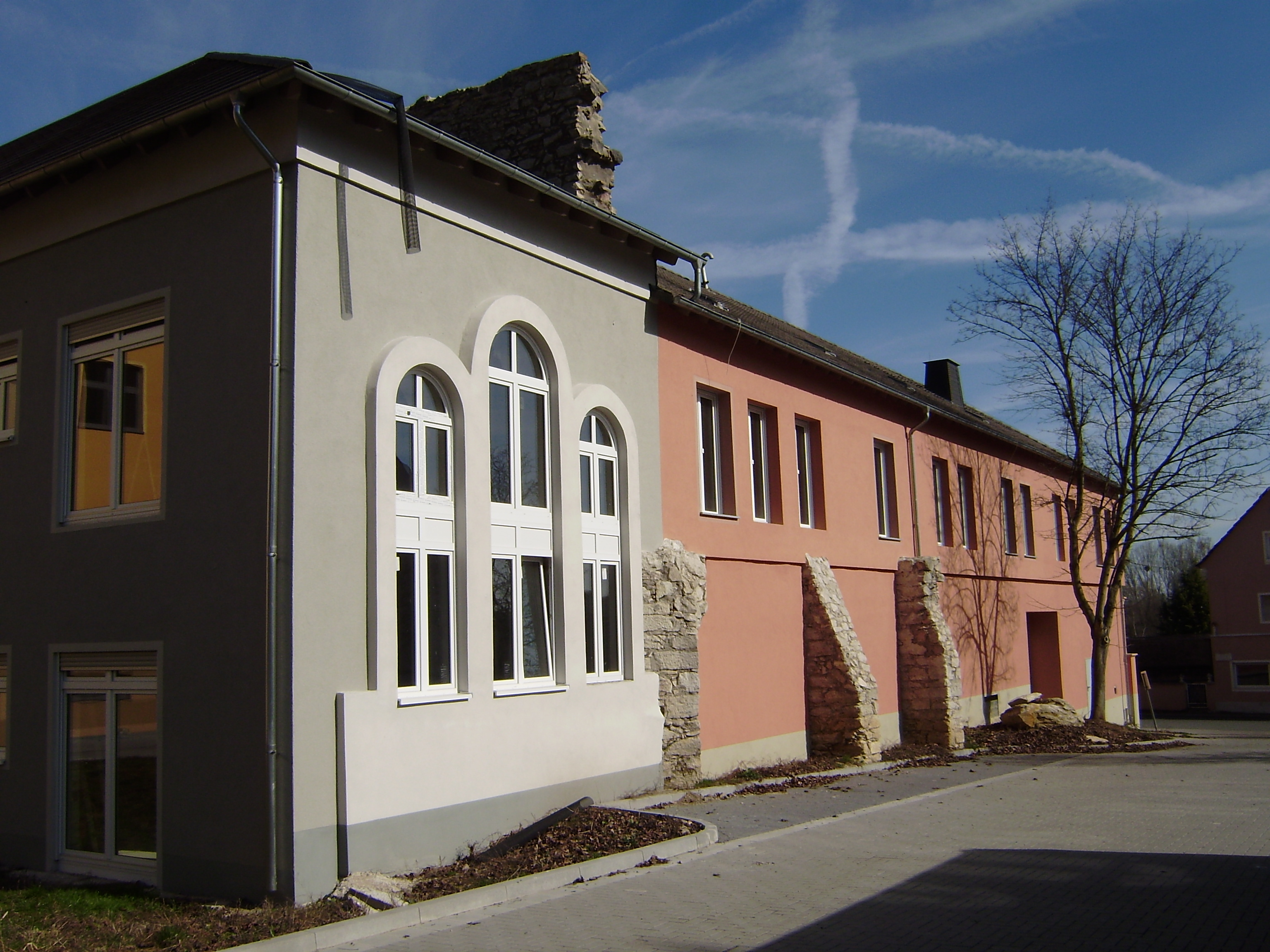 Kloster Mariacron, Oppenheim, Stütz- und Trennmauerreste in ehemaliger Weinbrennerei von Südwesten